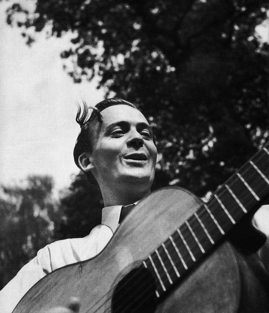 Lille Bror Söderlundh